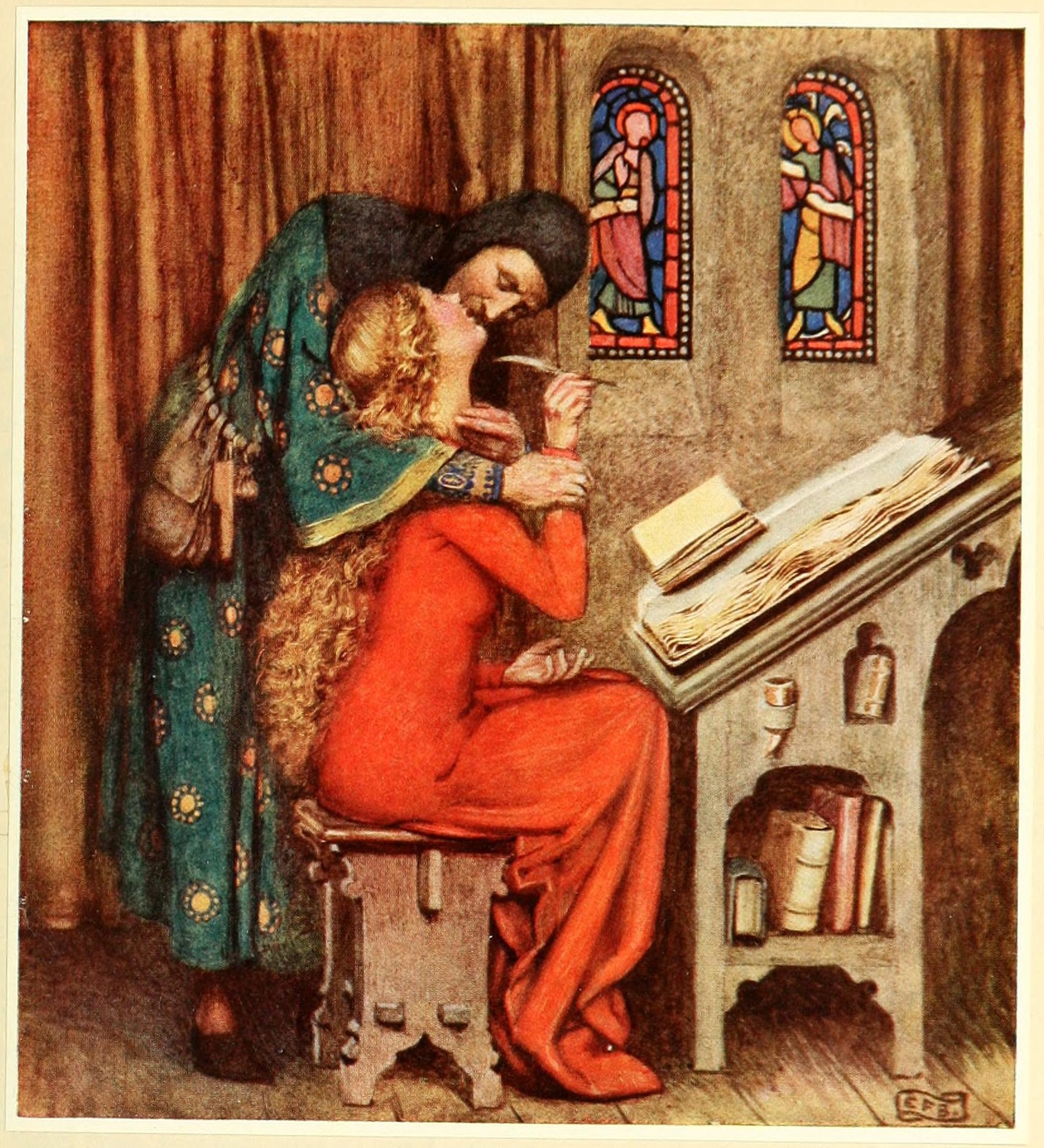 Illustration d'Eleanor FORTESCUE BRICKDALE tirée de son ouvrage Golden book of famous women, Londres : Hodder and Stoughton, 1919.